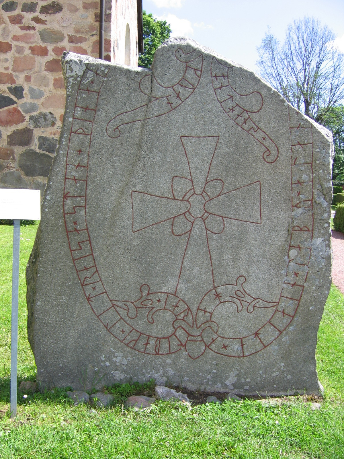 Runestone U 212 in Vallentuna.